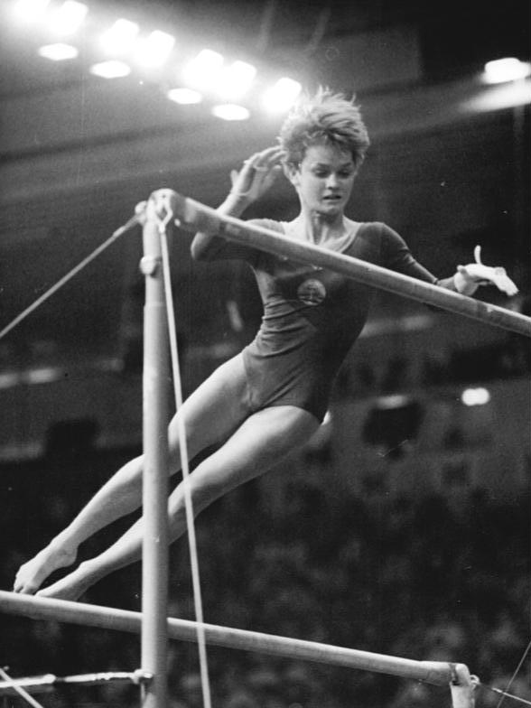 ADN-ZB-Schaar-2.11.1971-ma-Berlin: Karin Janz: Dank durch gute Leistungen. "Am 14. November gebe ich mit Freude meine Stimme den Kandidaten der Nationalen Front. Neben guten schulischen und sportlichen Leistungen soll mein "ja" ein Dank für die den Sportlern gewährte Hilfe und Unterstützung sein", sagte die 19jährige Turnweltmeisterin von Ljubljana am Barren und in Sprung, Karin Janz (SC Dynamo Berlin, Foto von einem früheren Wettkampf), in Vorbereitung auf die Volkswahlen. (siehe auch ADN-Meldung v. 2.11.71)"